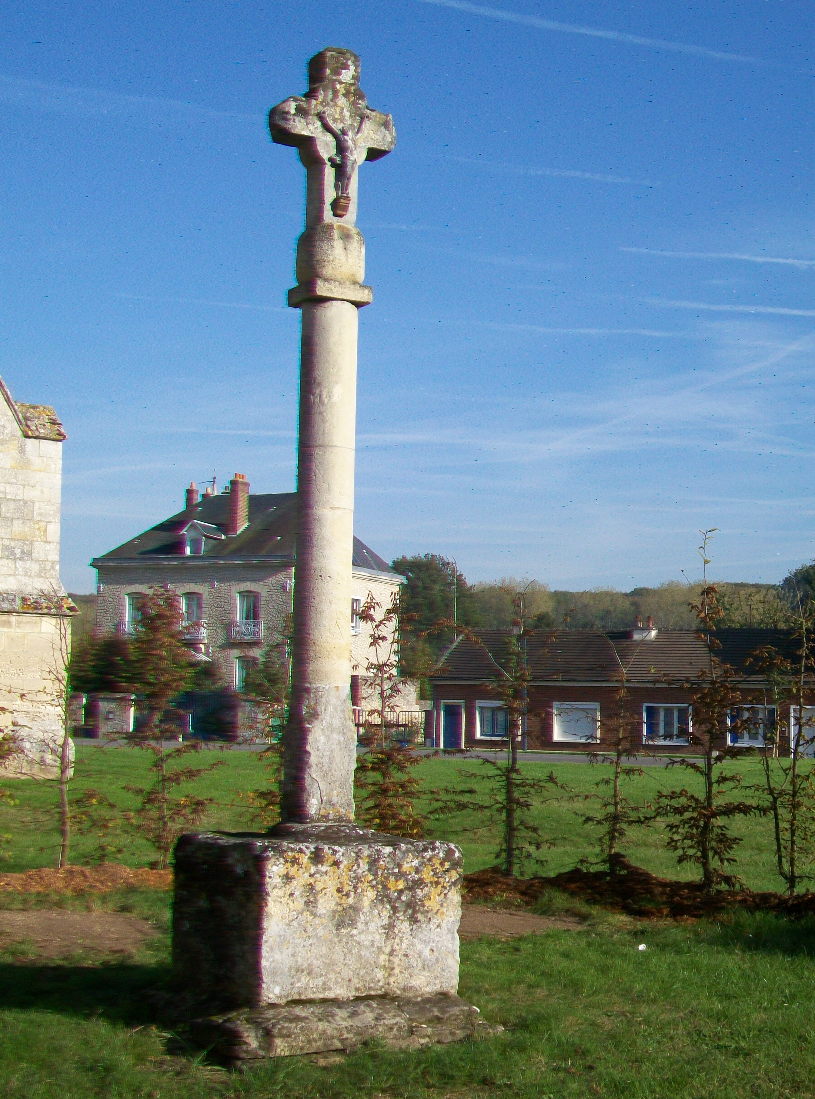 Le calvaire reconstitué sur la place de l'Église.